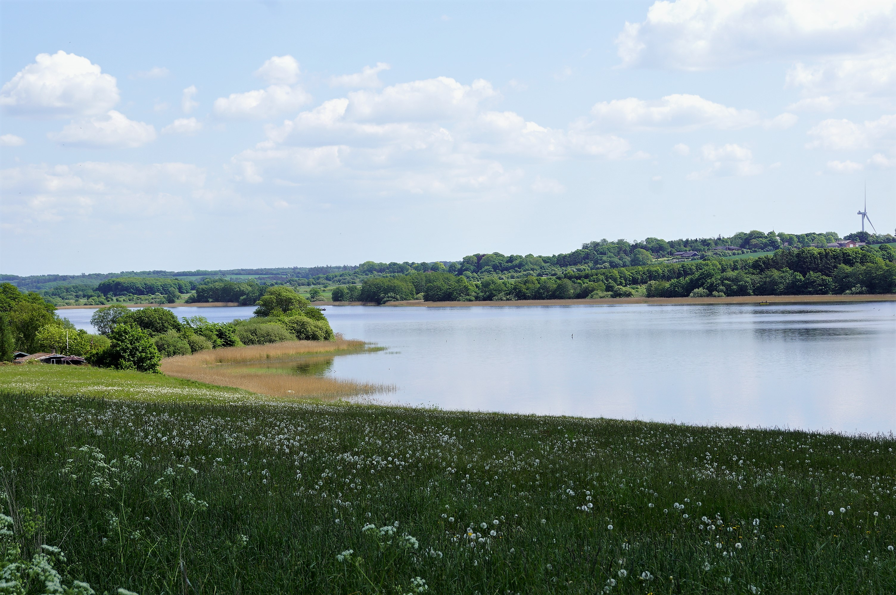 Glenstrup Sø set mod sydøst